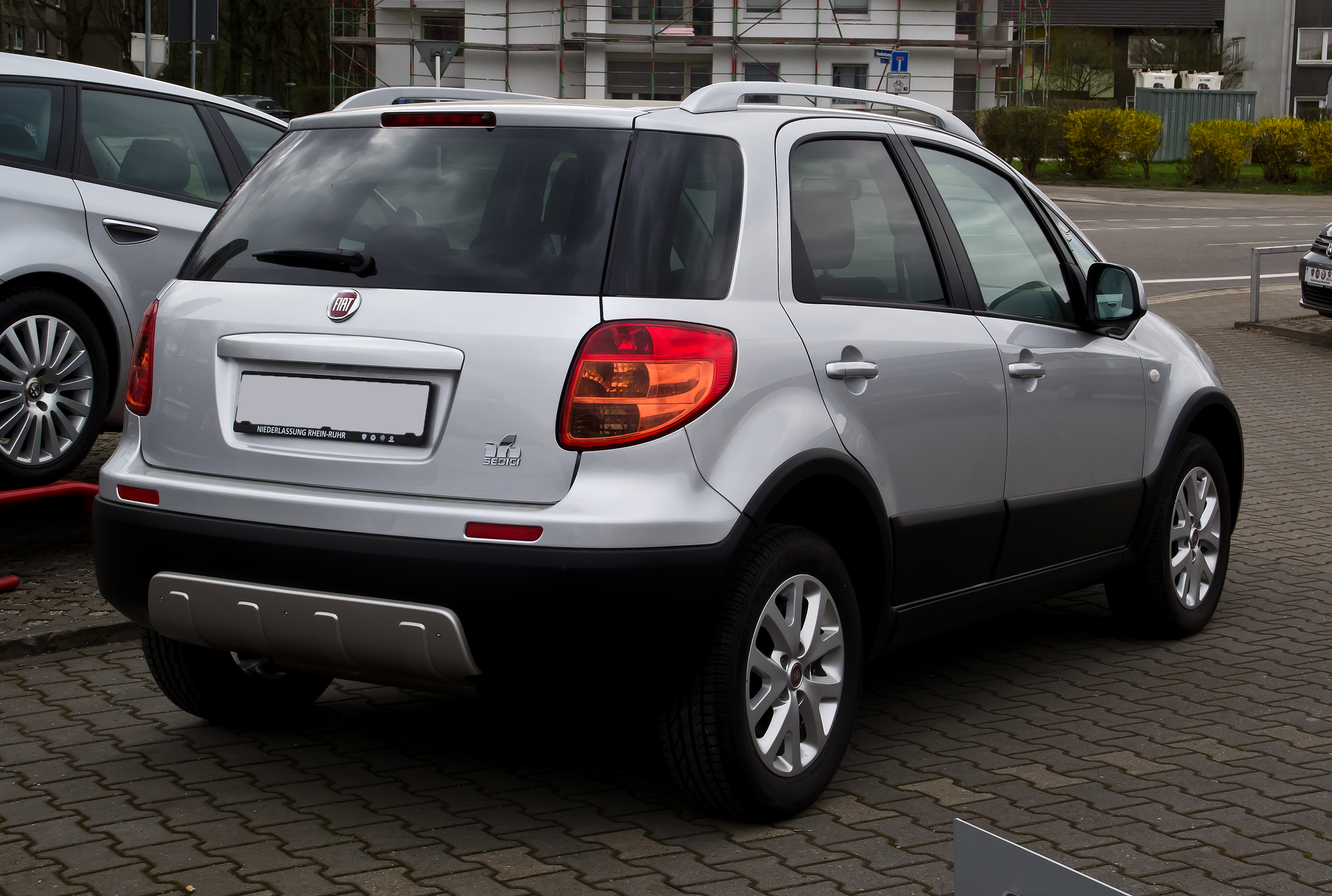 Fiat Sedici 2.0 16V Multijet Luxury (1. Facelift)